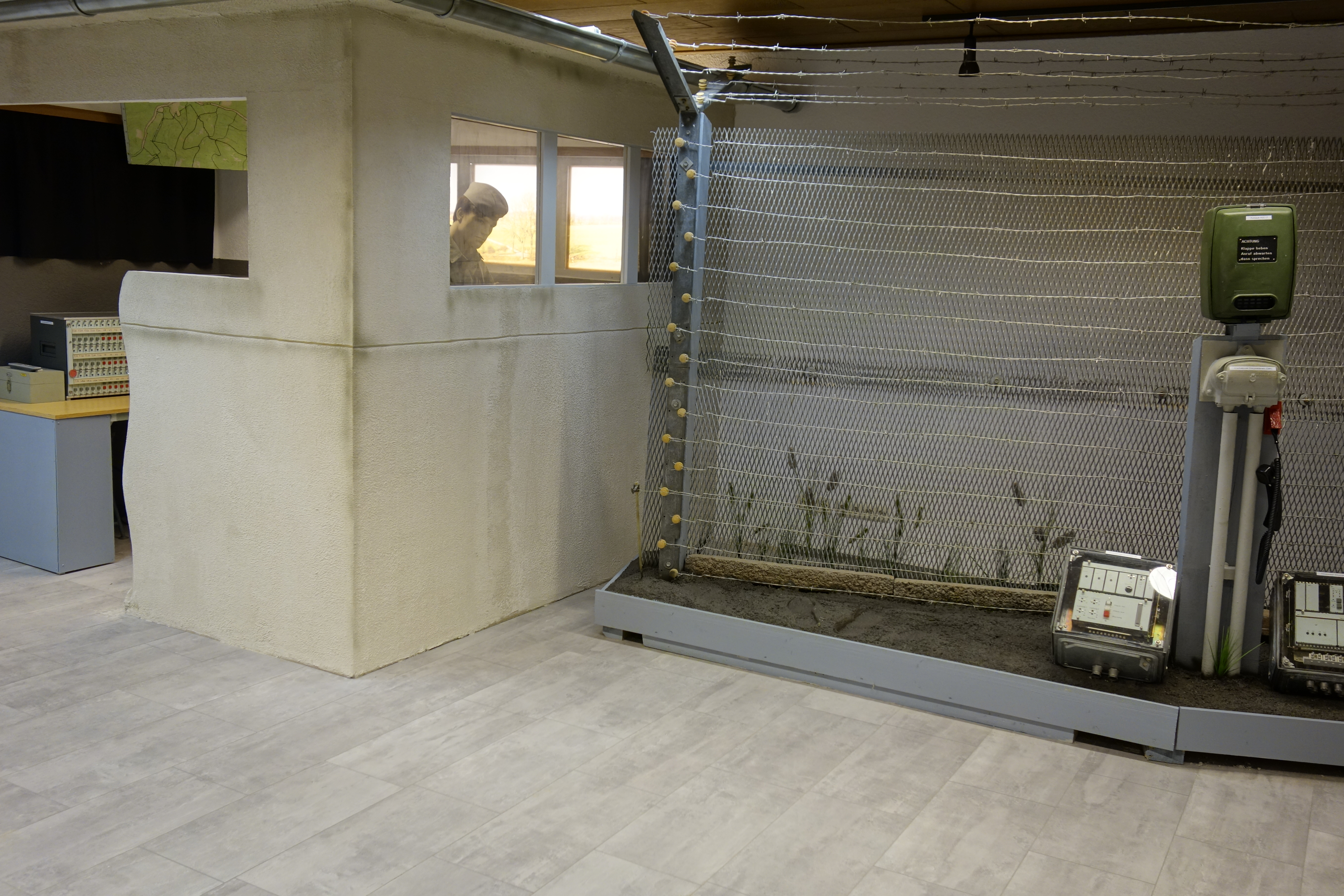 Die Installation der Grenzsignalzaunanlage 80 (GSZA 80) im neuen Standort Bad Sachsa